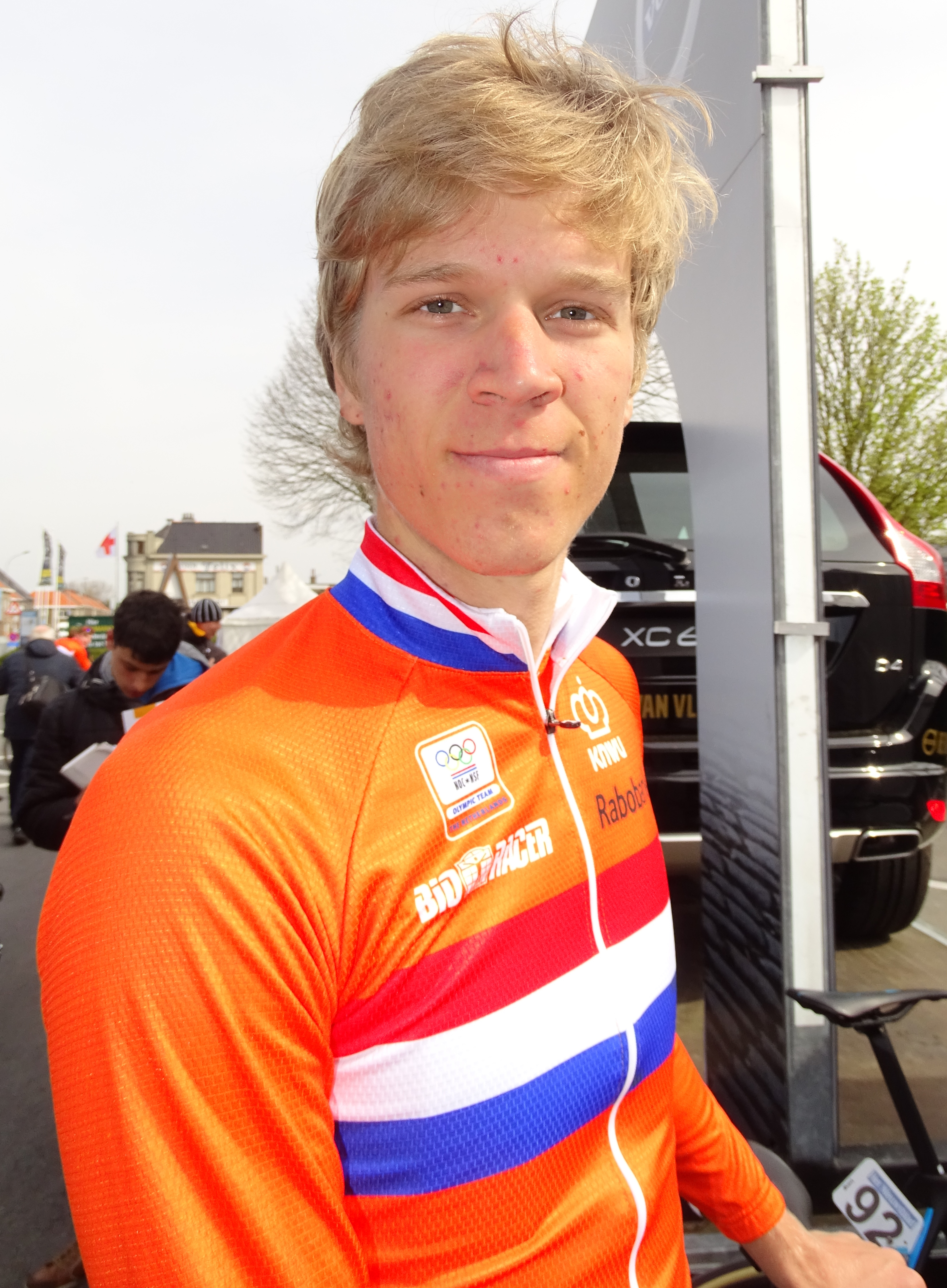 Reportage réalisé le samedi 9 avril à l'occasion du départ et de l'arrivée du Tour des Flandres espoirs 2016 à Audenarde, Belgique.